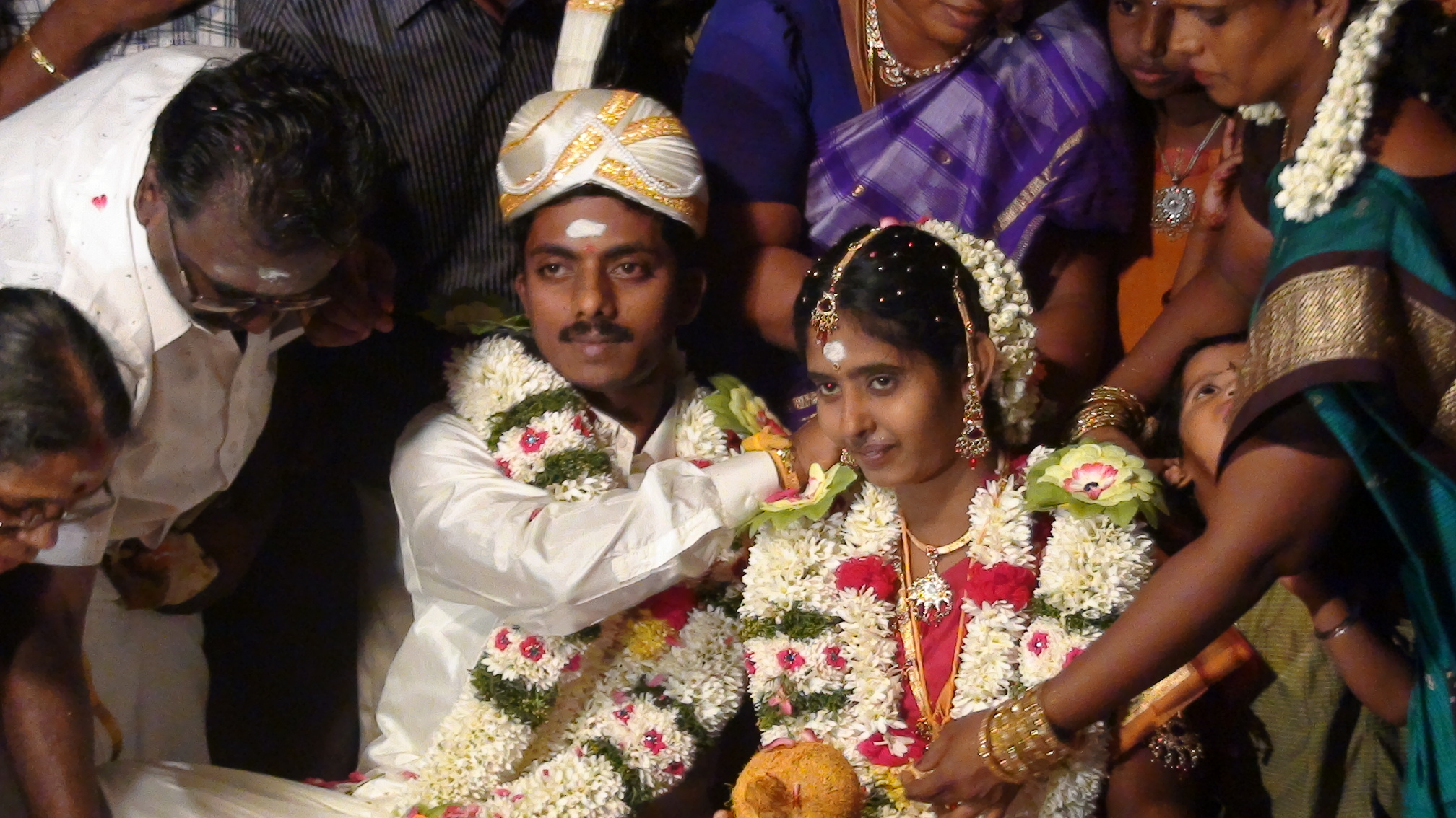 தமிழர்தம் மனையறத்தின் முக்கிய நிகழ்வான மங்கல நாண் அணிவித்தல் என்னும் தாலிகட்டு நிகழ்ச்சி.